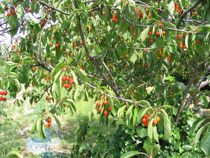 Prunus cerasus (griottier) à Ille-sur-Têt (Pyrénées-Orientales, France).